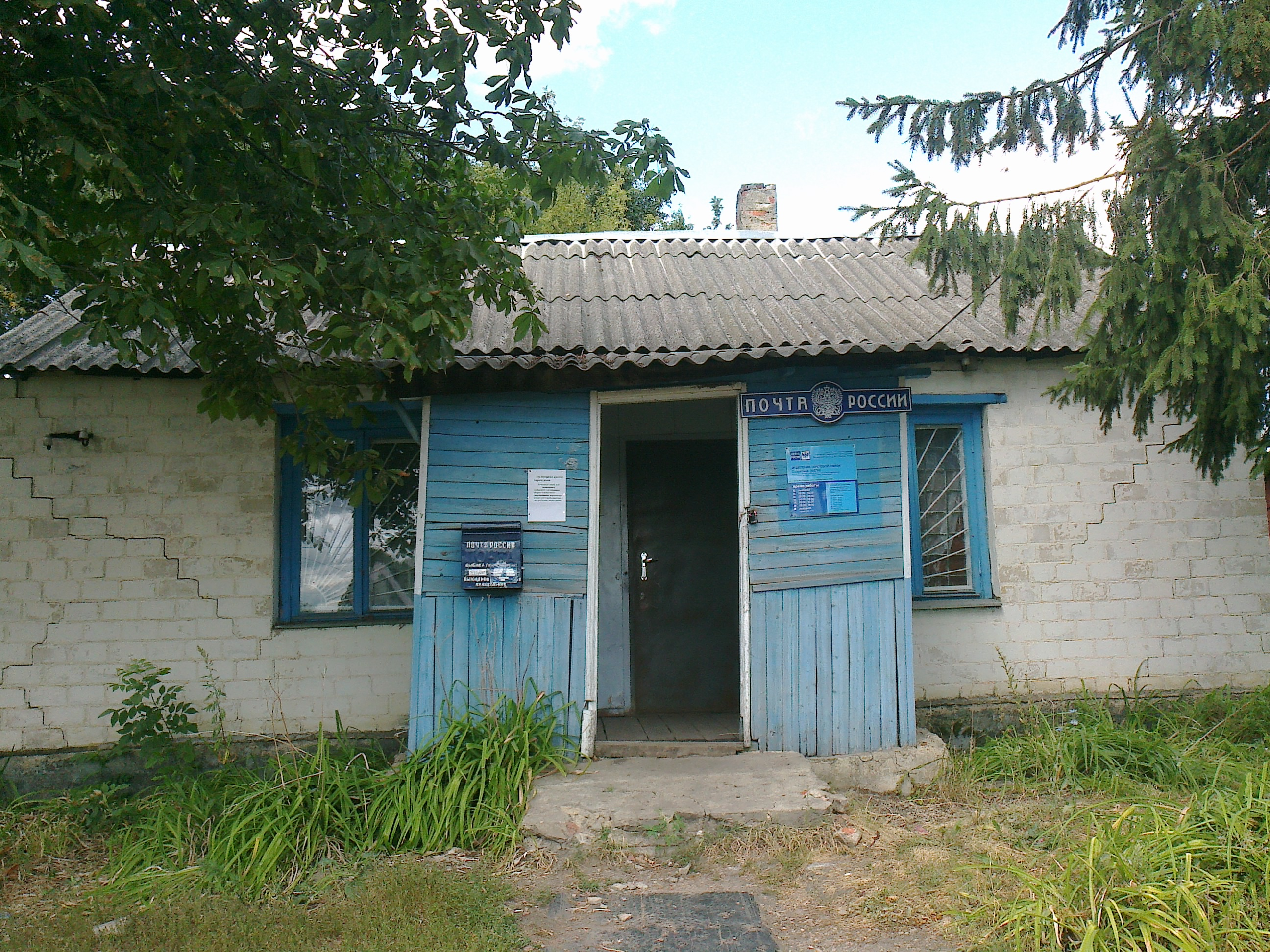 Почтовое отделение посёлка Скорятино, Орловская область